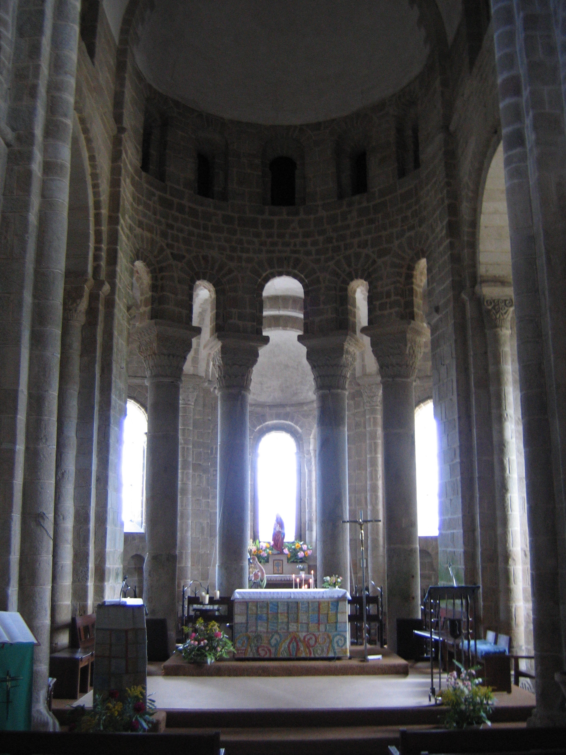 Kirche Saint-Tudy in Loctudy